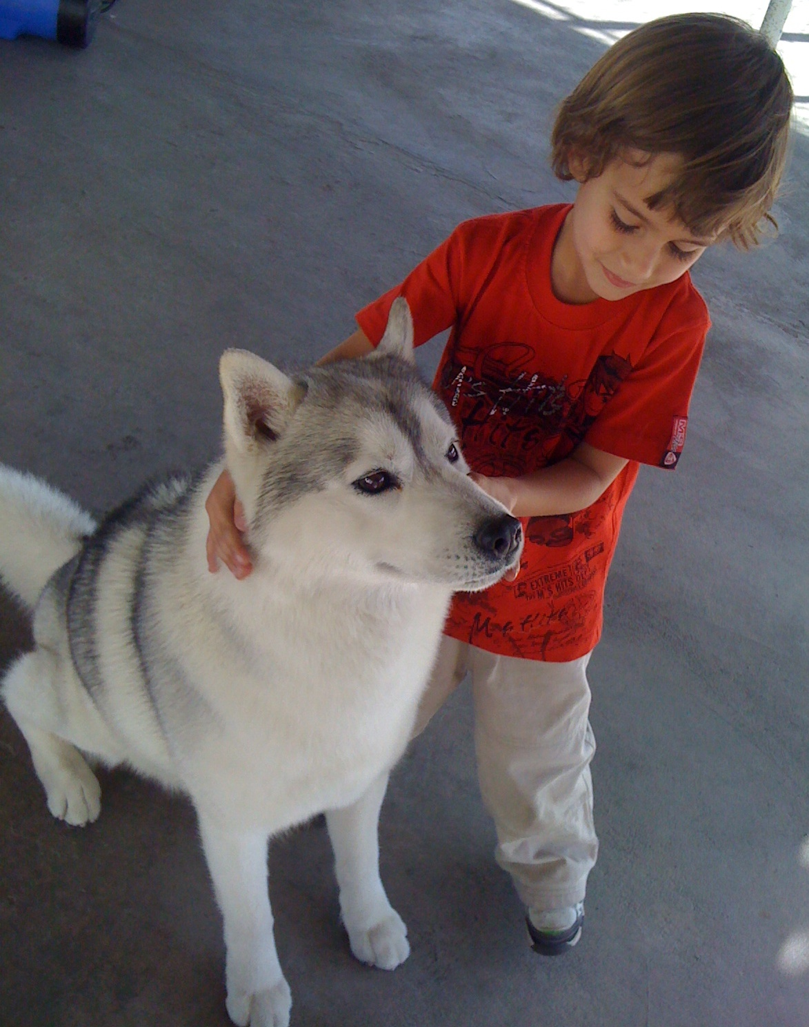 Los huskyes son muy cariñosos, especialmente con los niños.